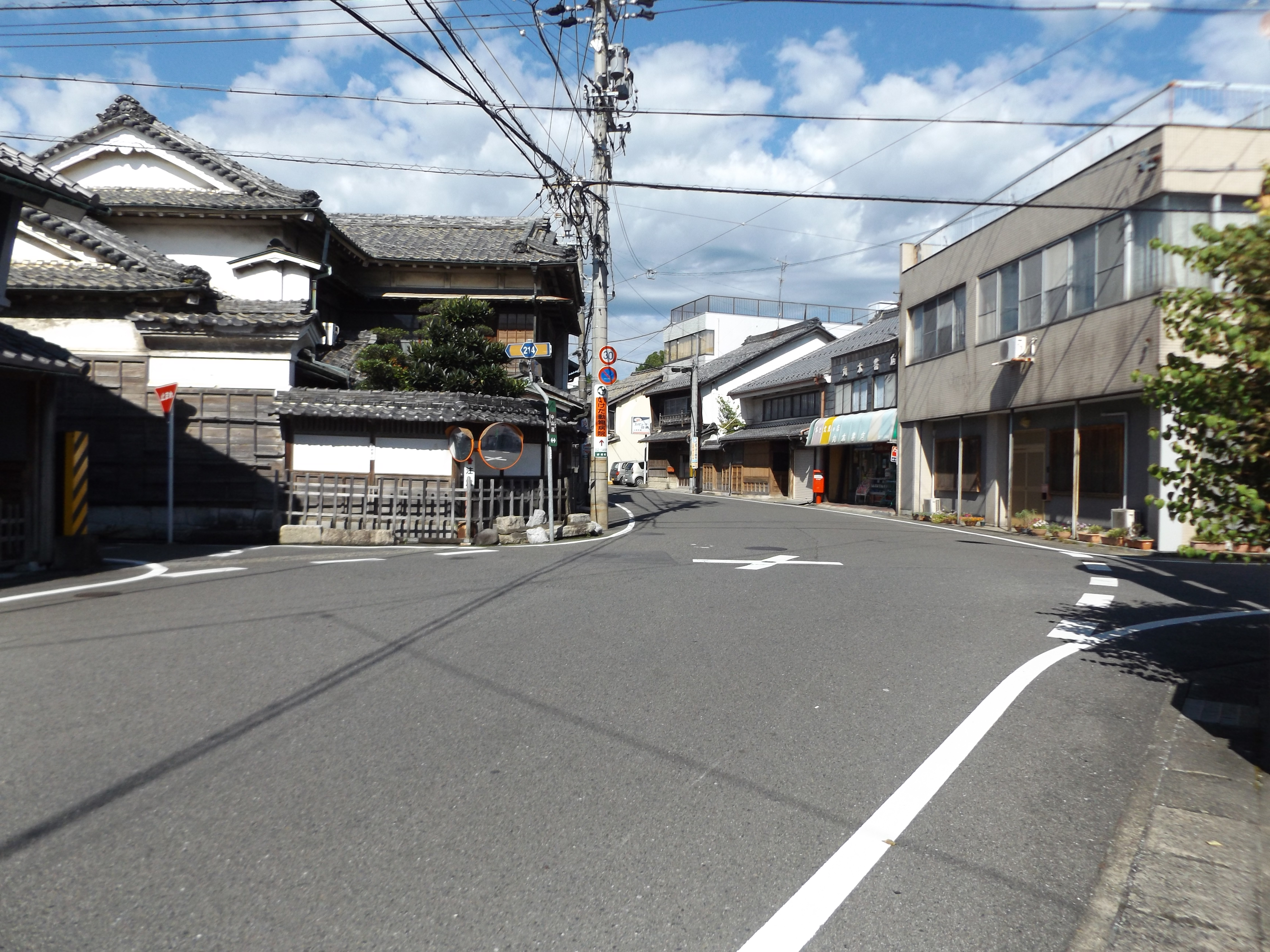 岐阜県大垣市赤坂町にある、岐阜県道214号養老赤坂線と岐阜県道216号赤坂垂井線の交点。県道214号はここが終点。